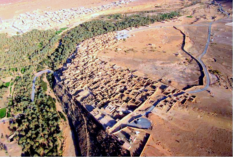 صورة من القمر الصناعي